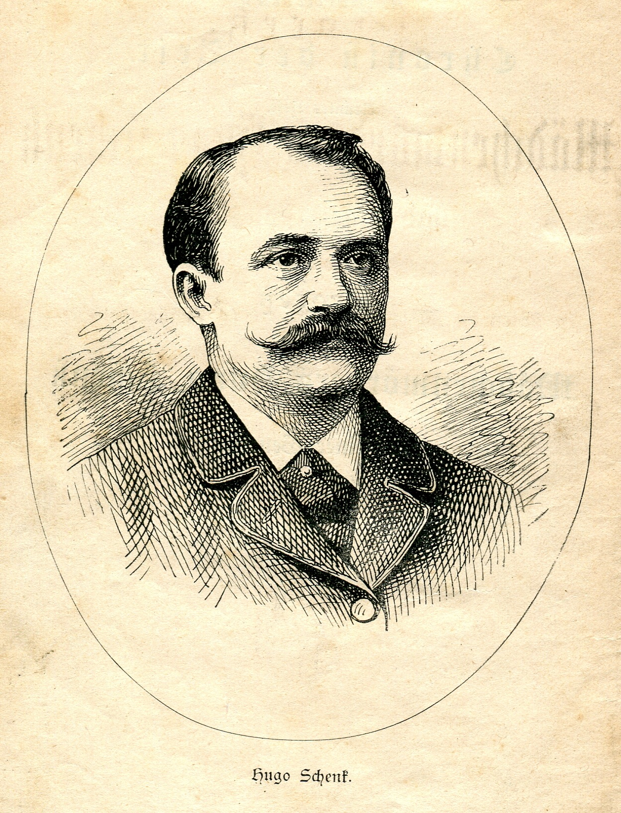 Porträt des Serienmörders Hugo Schenk aus der Publikation: Proceß des Mädchenmörders Hugo Schenk und seiner Genossen, verhandelt in Wien im März 1884 vor dem Ausnahmegerichte. Nach authentischen Berichten bearbeitet, Wien 1883